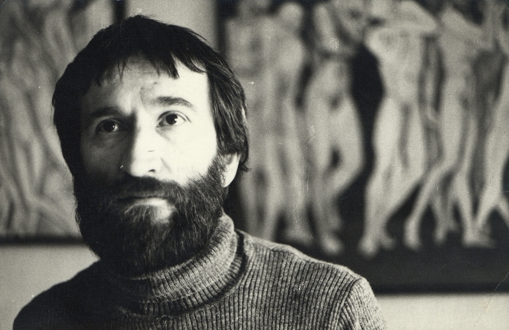 Josip Konta 1970-ih